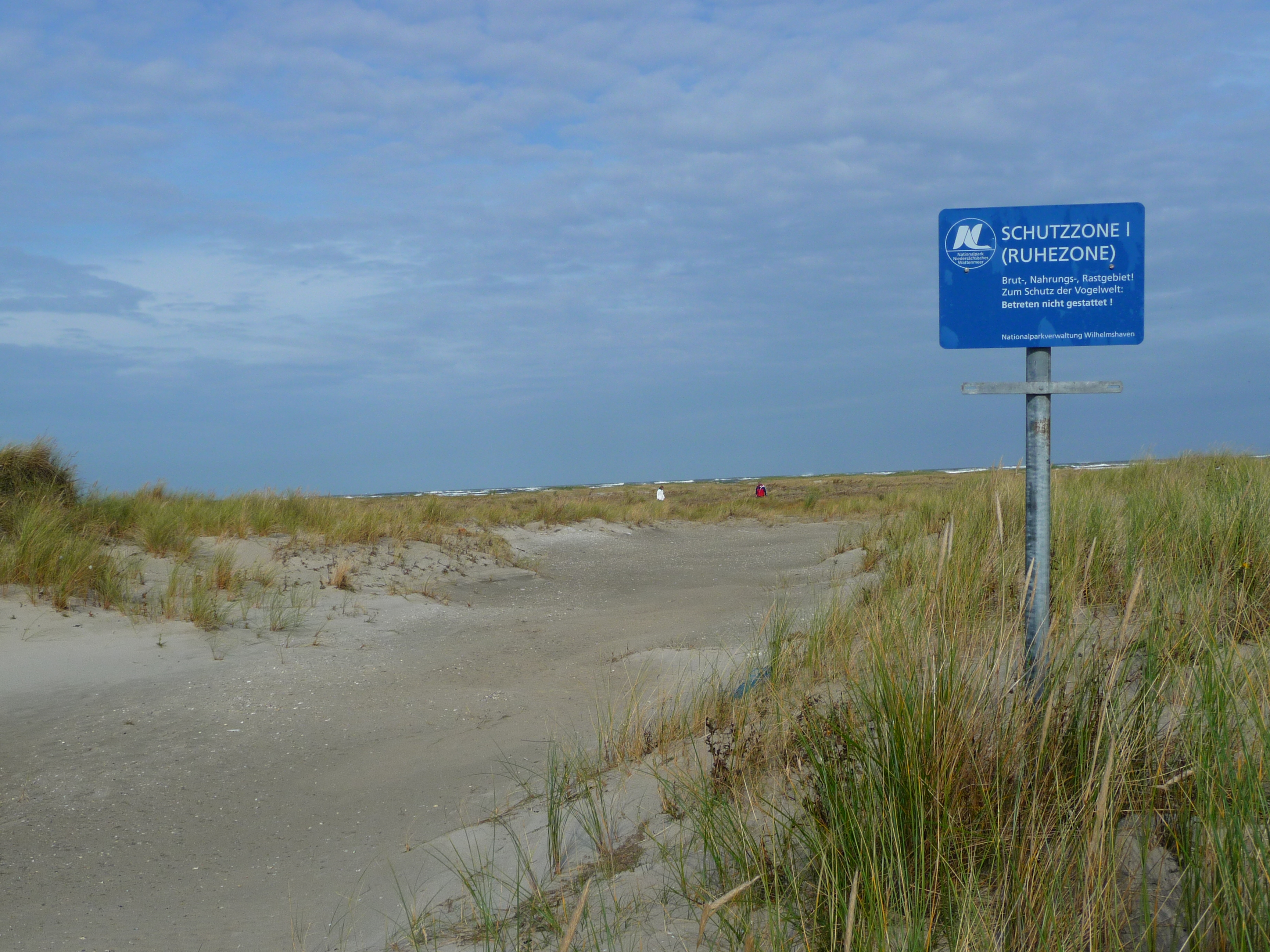 Blick in die Schutzzone I des Nationalpark Niedersächsisches Wattenmeer am Kalfamer, der Ostspitze der ostfriesischen Nordseeinsel Juist (Niedersachsen, Deutschland)